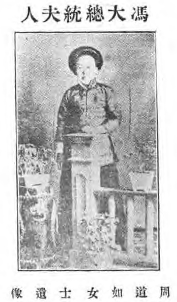 治家全書圖像